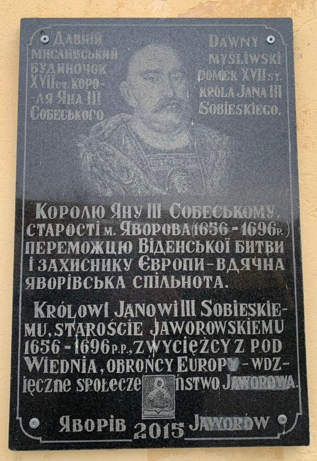 Герб будинку короля Яна ІІІ Собєського